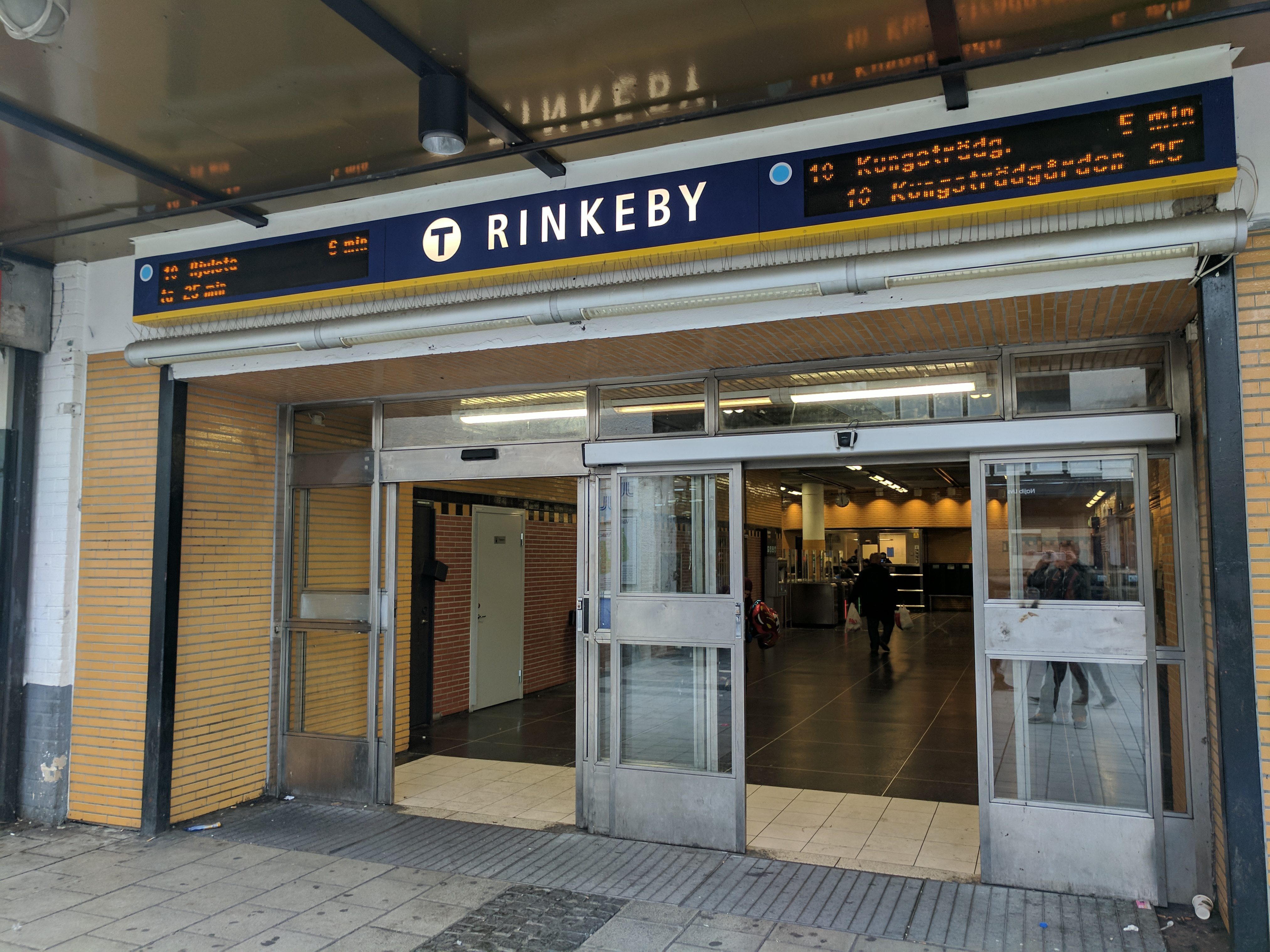 Rinkeby metro 20170902